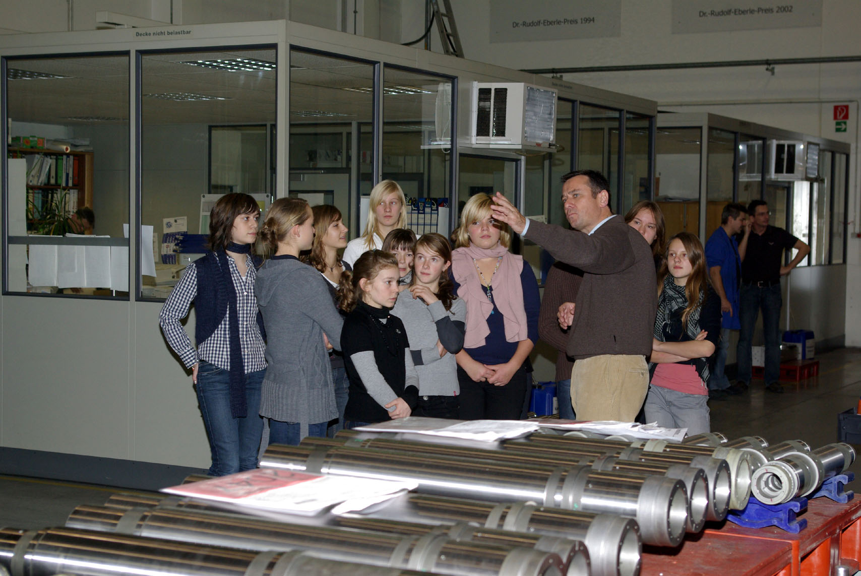 Besuch des Progymnasiums im Rahmen des Kurs21 Projektes des Landes Baden-Württemberg bei der Franz Kessler GmbH. Geschäftsführer Eckhard Herwanger führt eine Schulklasse durch das Werk.